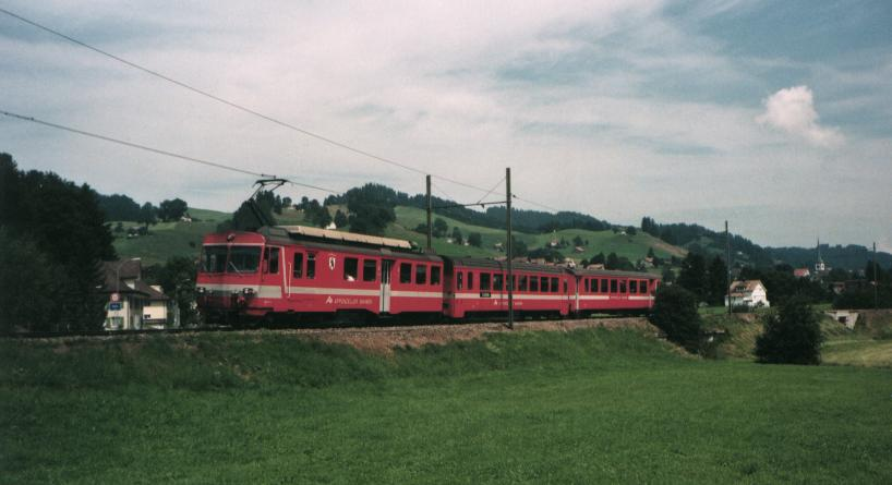 Description